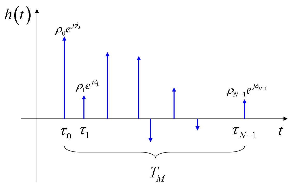 multipath impulse response